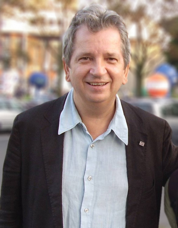 Juliusz Machulski (ur. 10 marca 1955 w Olsztynie) - polski reżyser filmowy, aktor